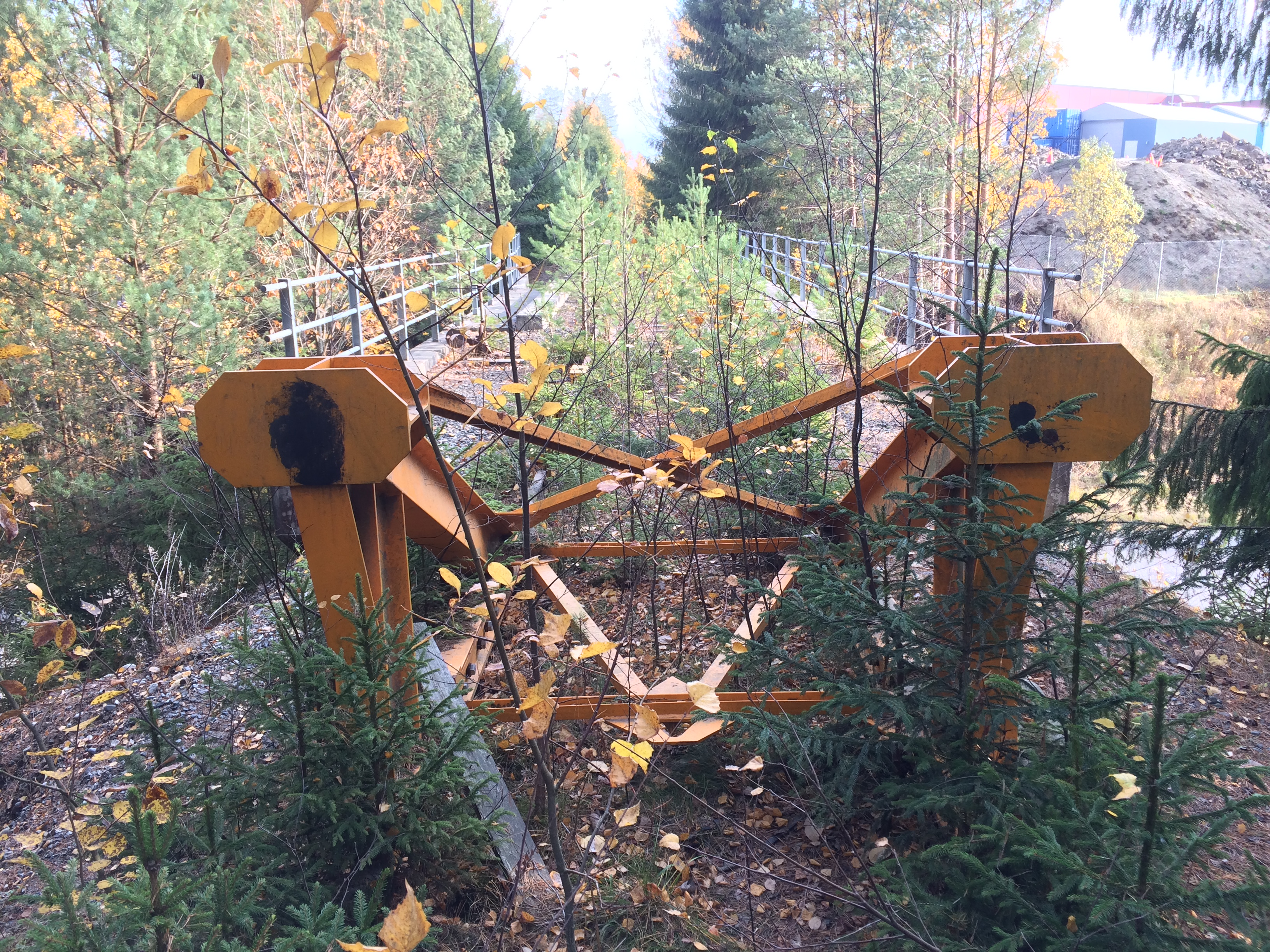 Bergermoen på Randsfjordbanen, der videre ferdsel forhindres av en buffer/sporsperre (samt vegetasjon i sporet).